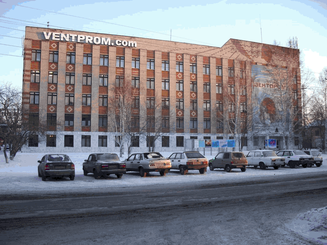 Вентпром